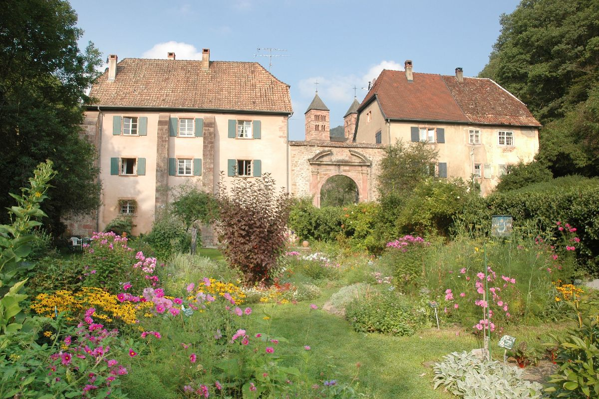 Beschreibung: Klostergarten des Kloster Murbach am Fuß des Großen Belchen im Elsass Ort: Murbach, Frankreich Quelle: selbst fotografiert Fotograf: Alex für die Wikipedia Kamera: Nikon D 70 Software: GIMP Andere Versionen